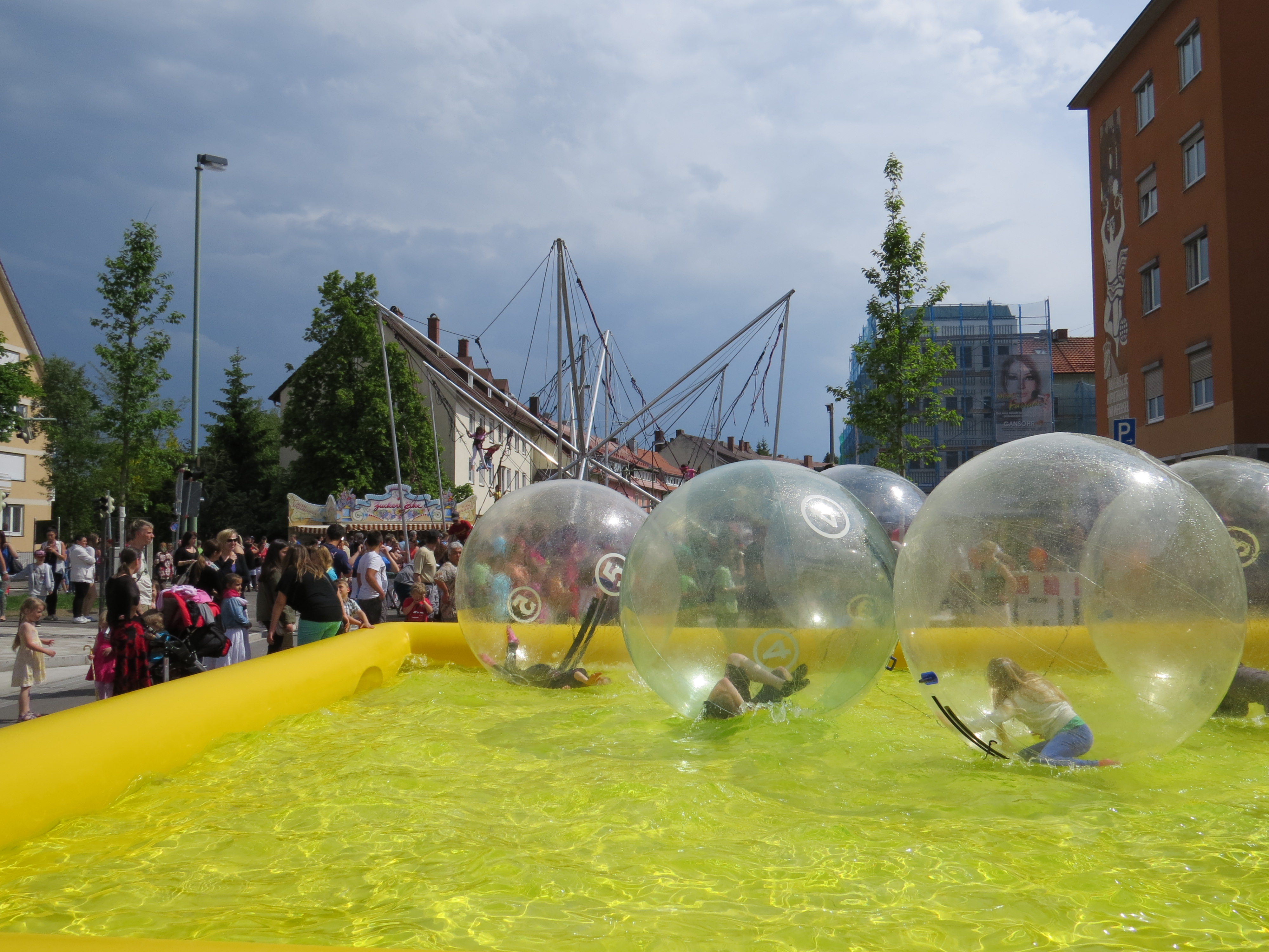 Bürgerfest in Neugablonz